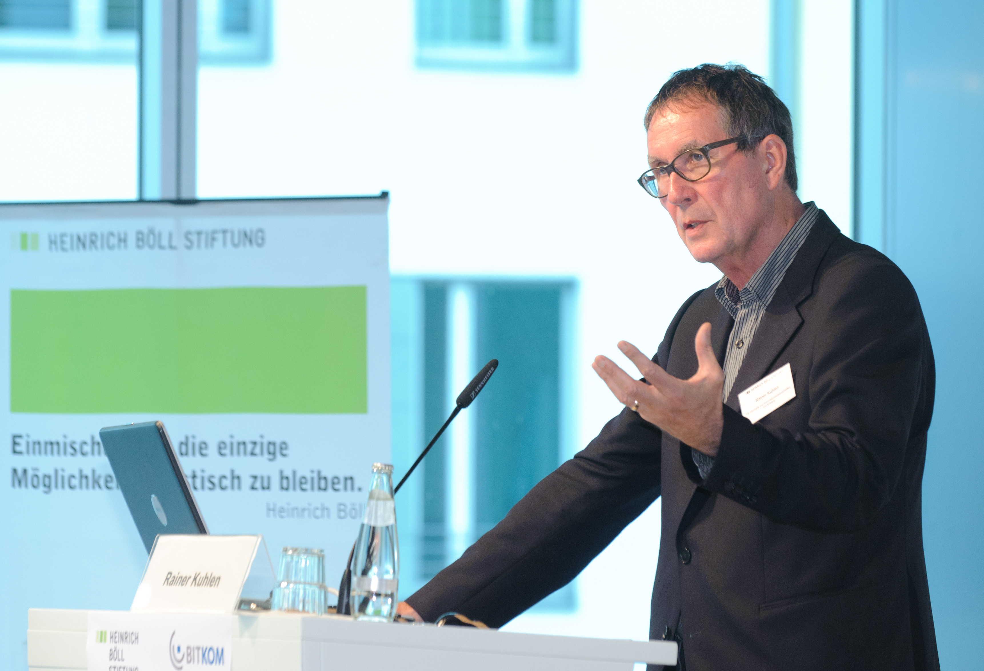 Konferenz: netz:regeln 2011 - Offenheit als Prinzip Prof. Rainer Kuhlen (Uni Konstanz, FB Informatik) Foto: Stephan Röhl